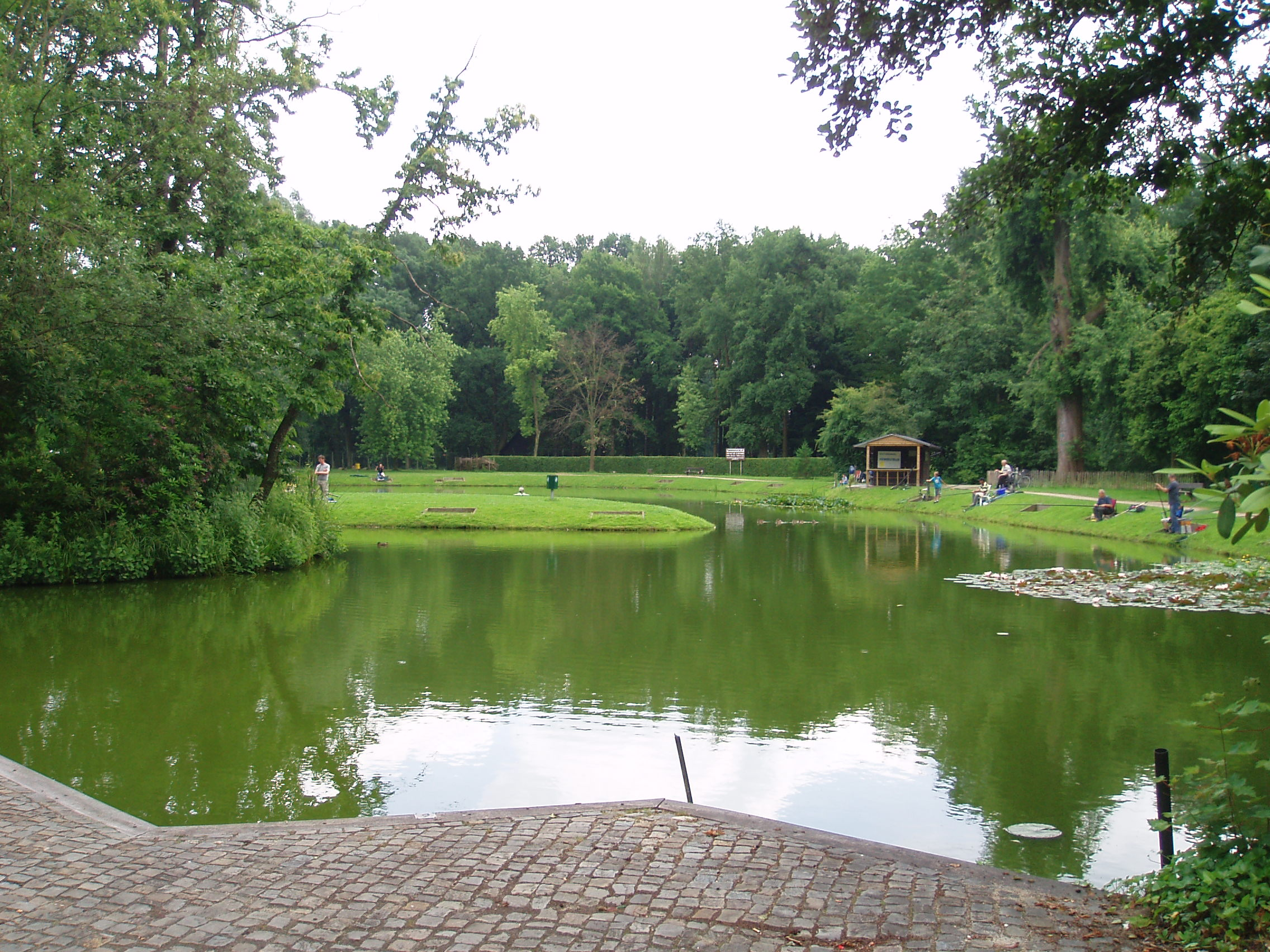 Kasteel de Pierpont - parkvijver 2013